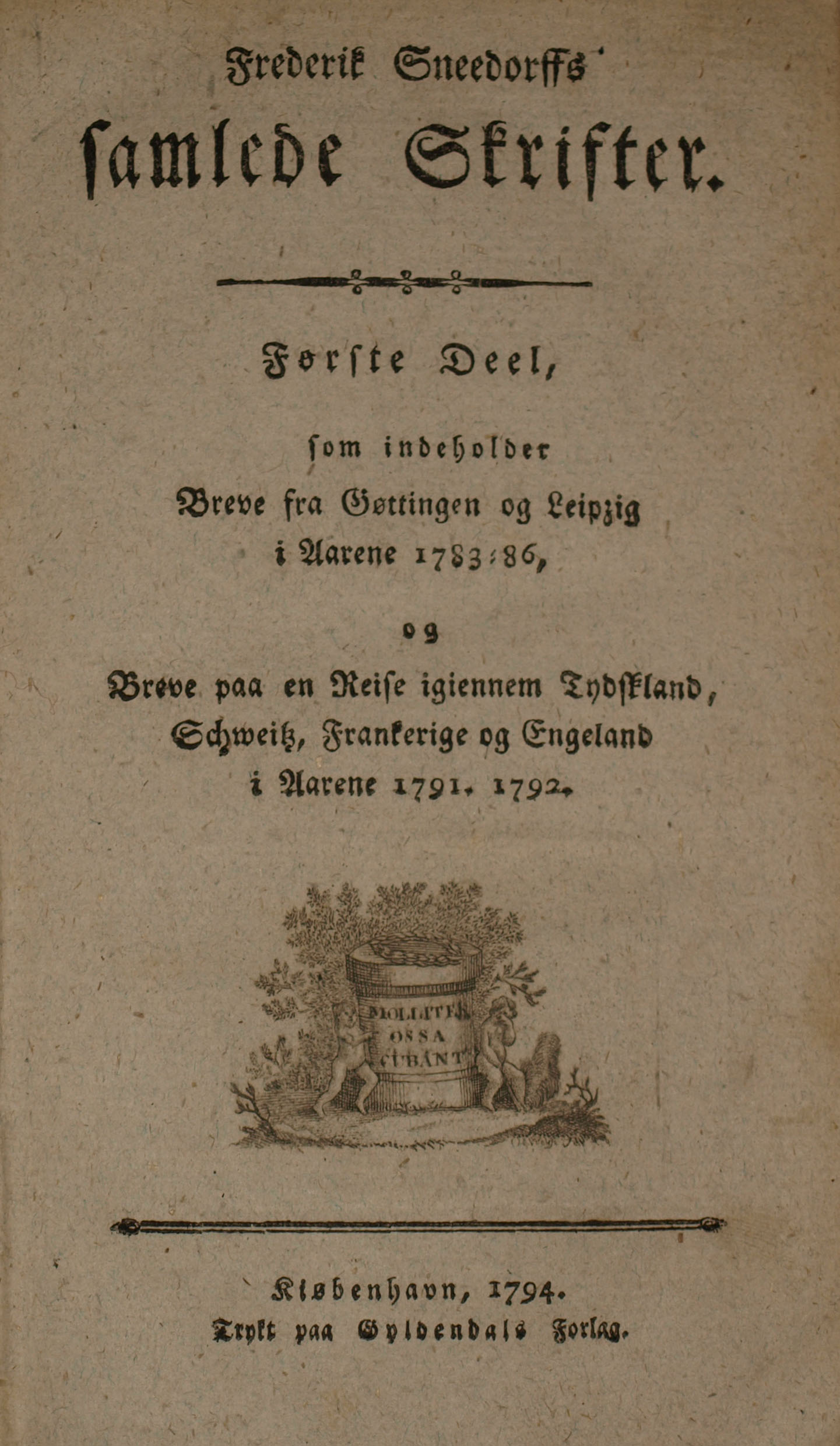 Titelbladet til Frederik Sneedorffs Samlede Skrifter bind 1, fra 1794.